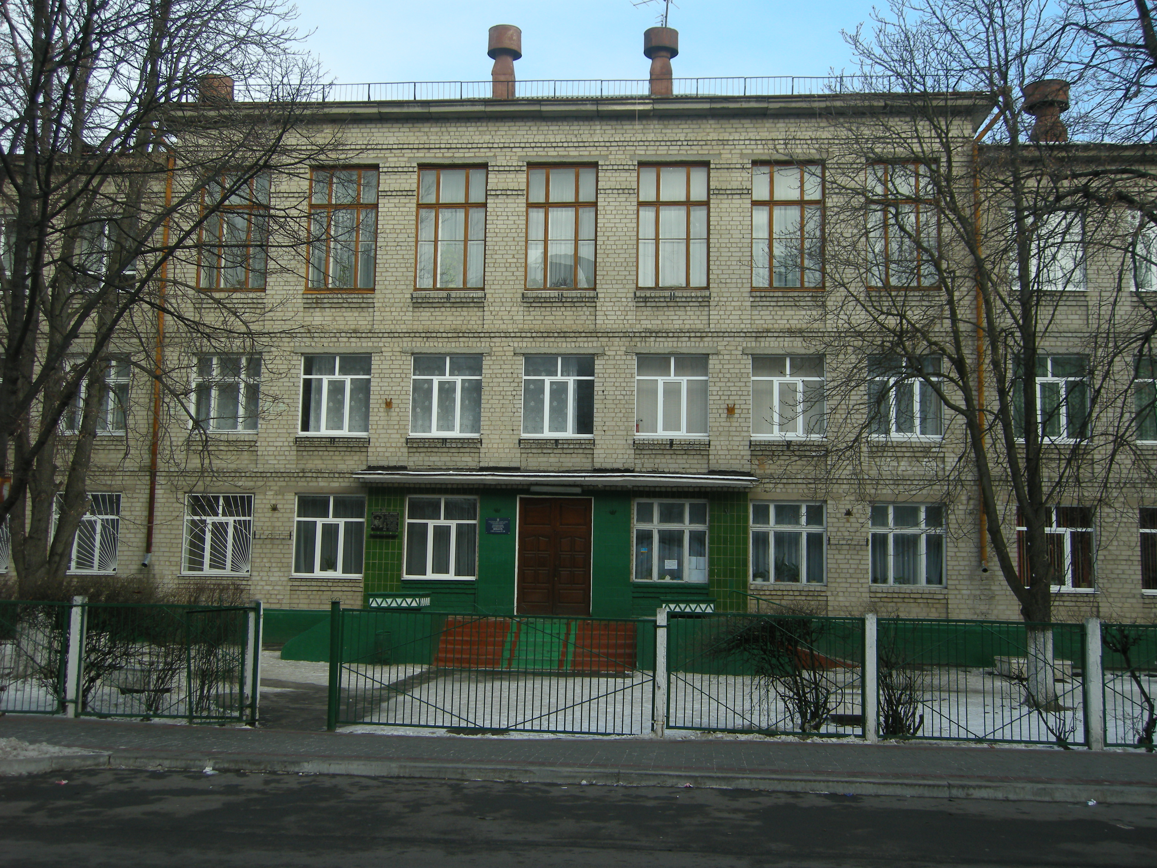 Кременчугская СОШ № 19